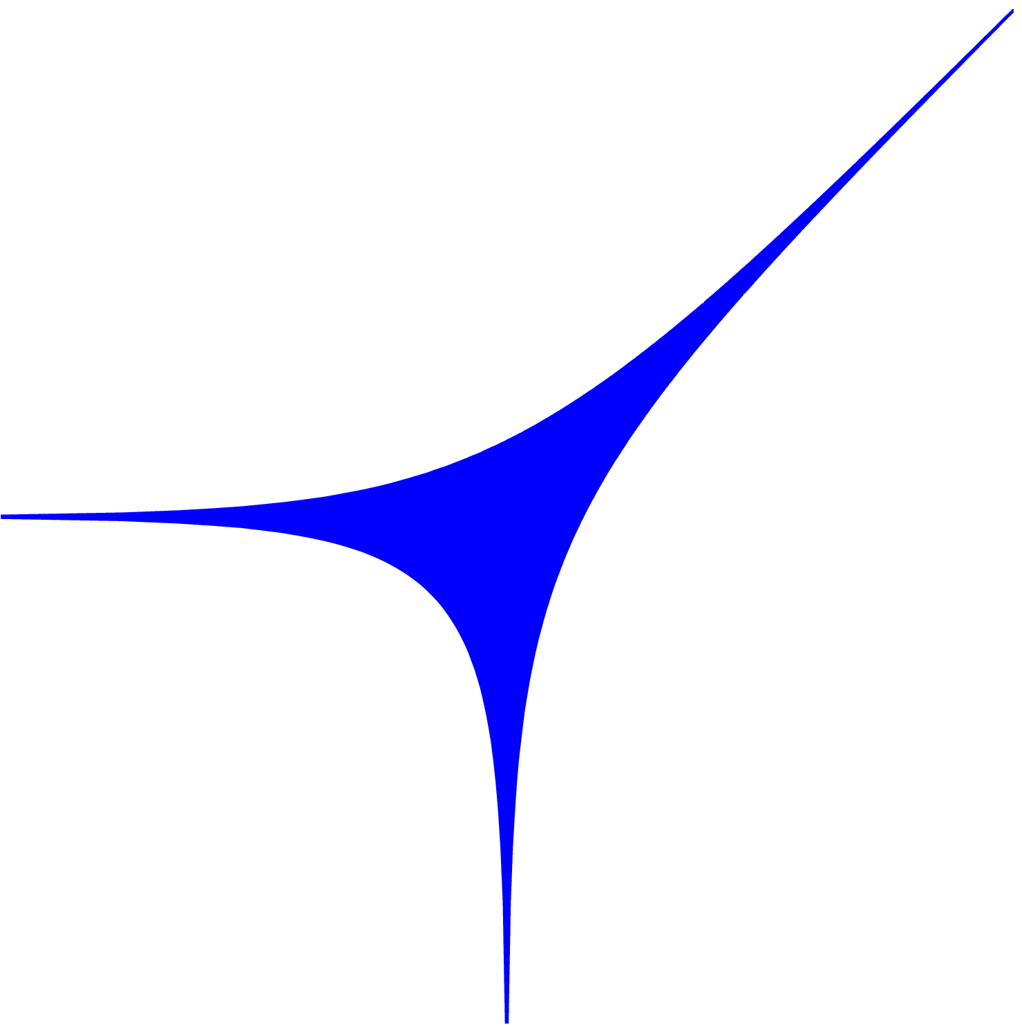 The amoeba of P(z,w)=w-2z-1